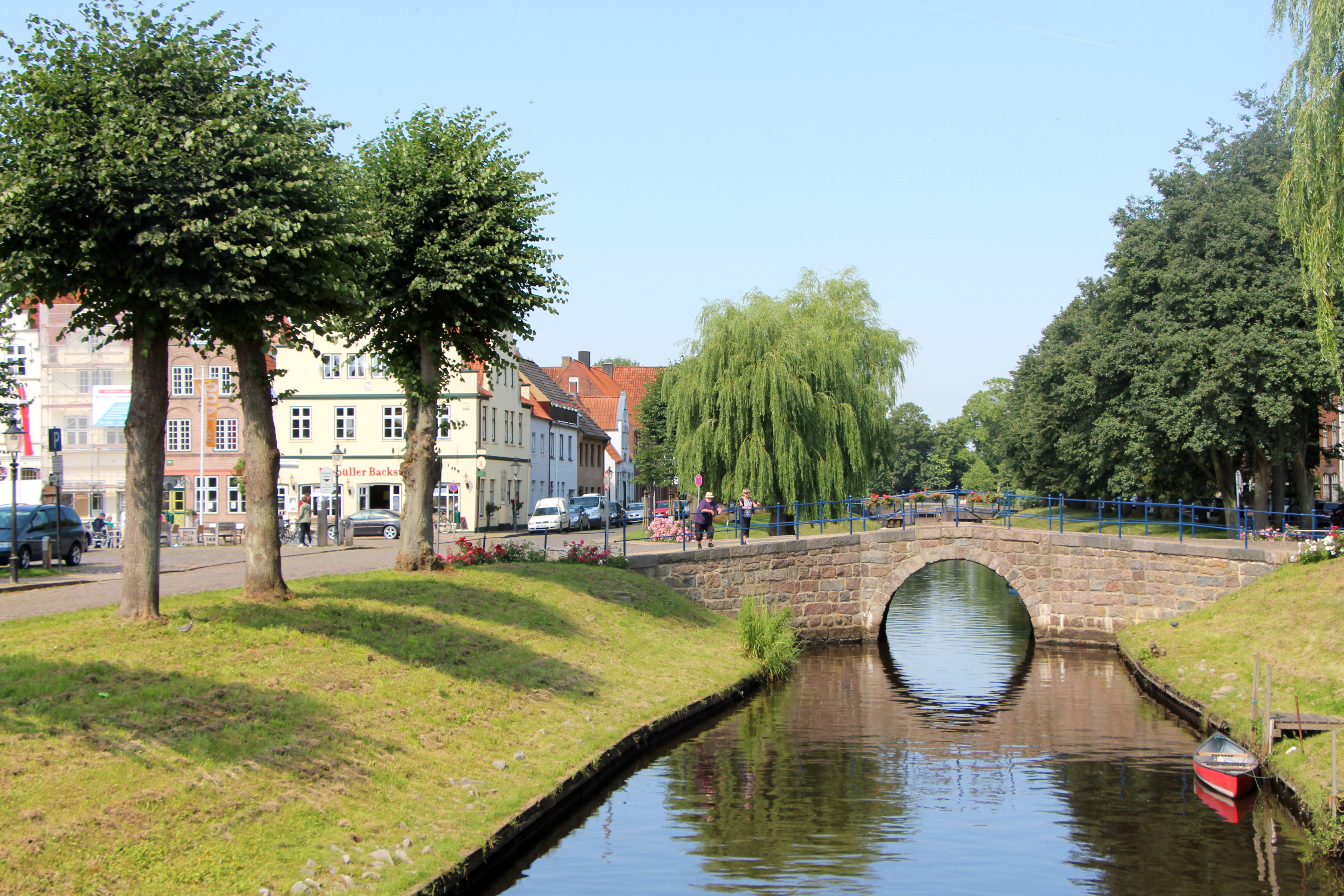 Friedrichstadt, Schleswig-Holstein